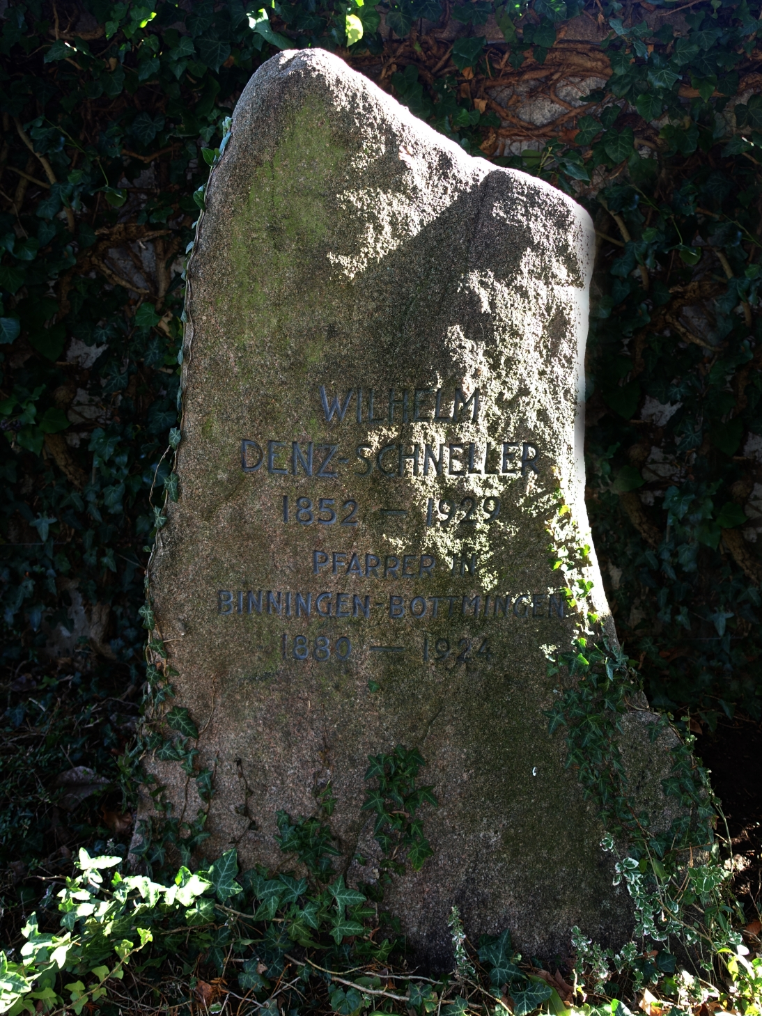 Wilhelm Denz-Schneller (1852-1929) Pfarrer in Binningen-Bottmingen (1880-1924) Grab auf dem Friedhof Sankt Margarethen (Nord) in Binningen